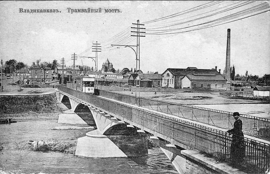 Трамвайный мост через р. Терек во Владикавказе. Начало XX в.